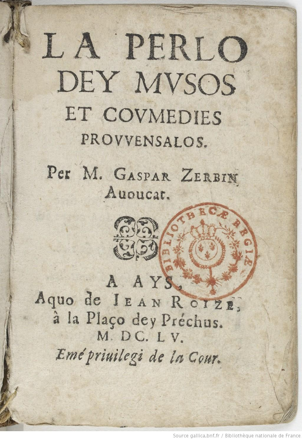 Premiera pagina de Zerbin